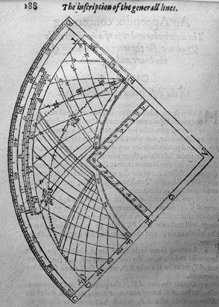 Quadrant de Gunter.